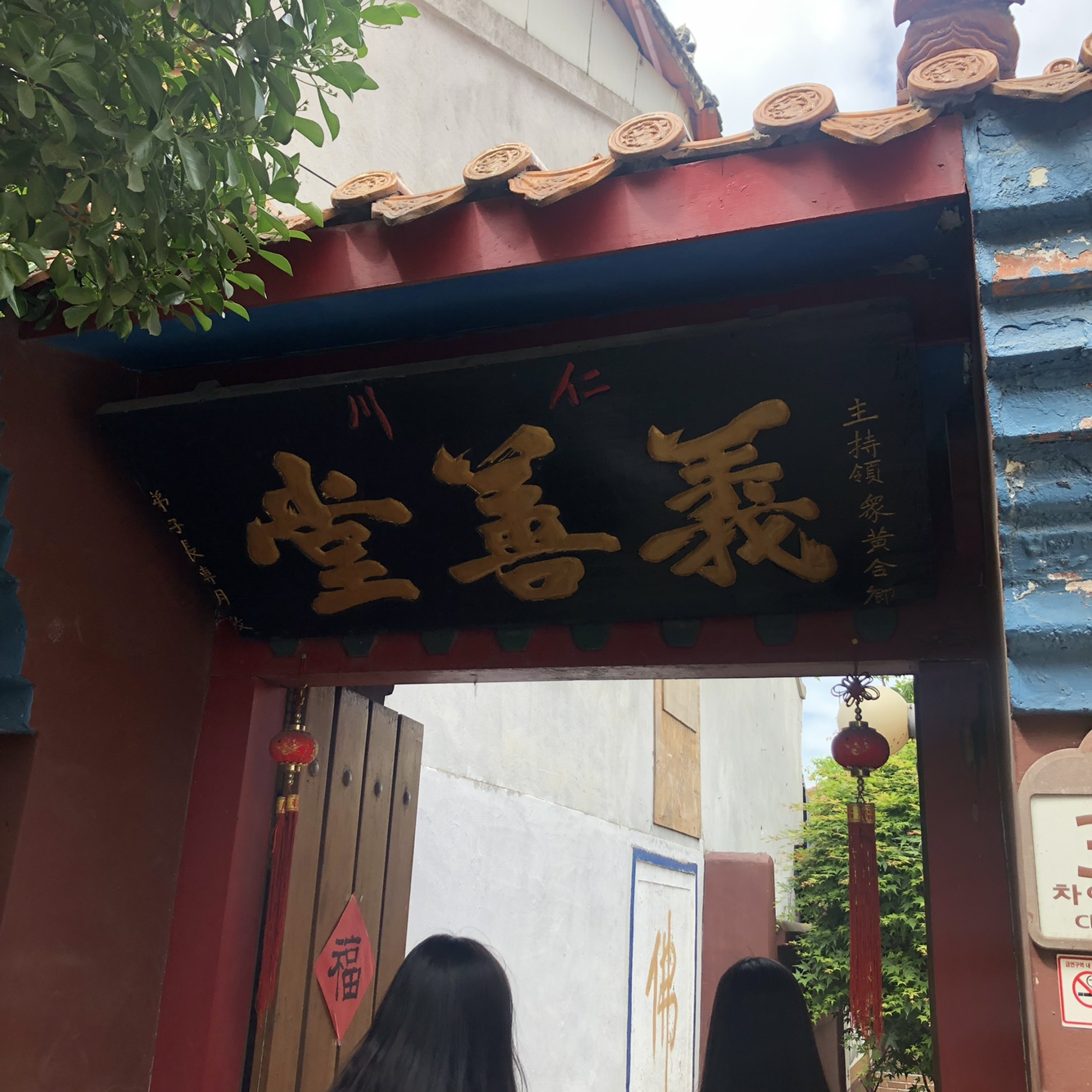 인천 차이나타운에 있는 의선당 외부